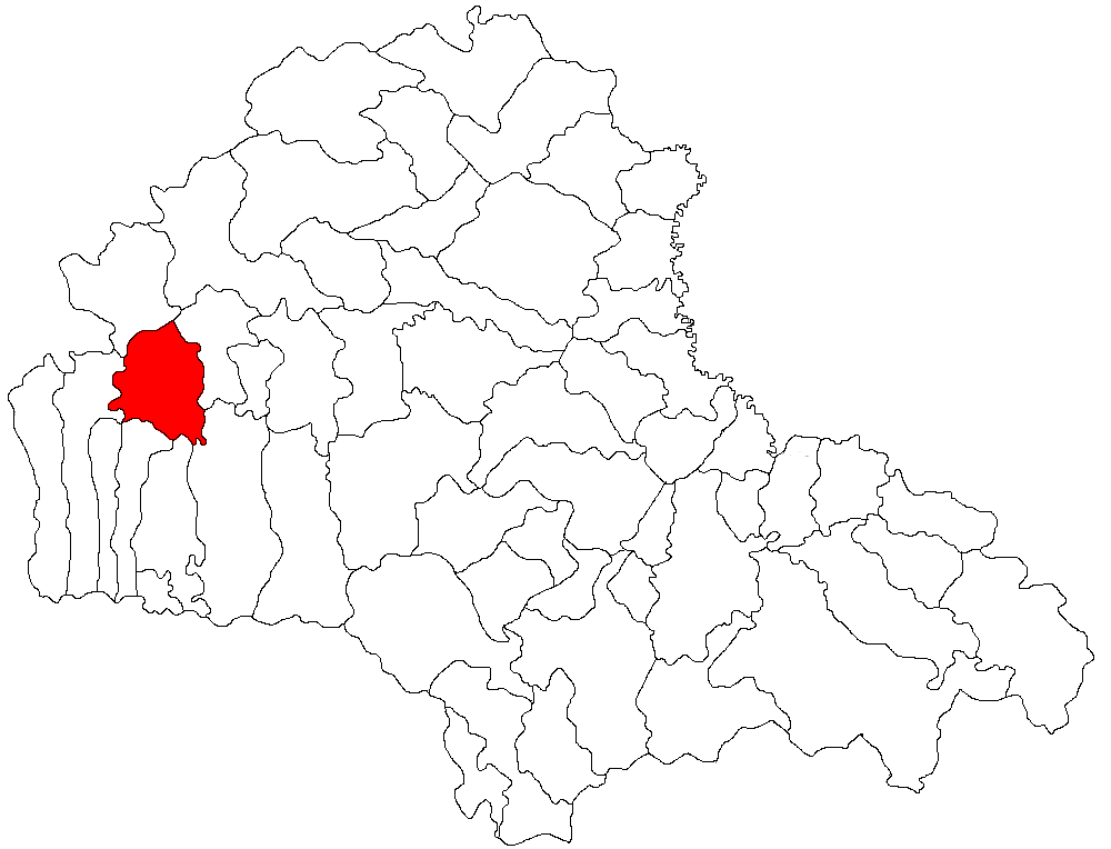 Categorie:Hărţi ale judeţului Braşov